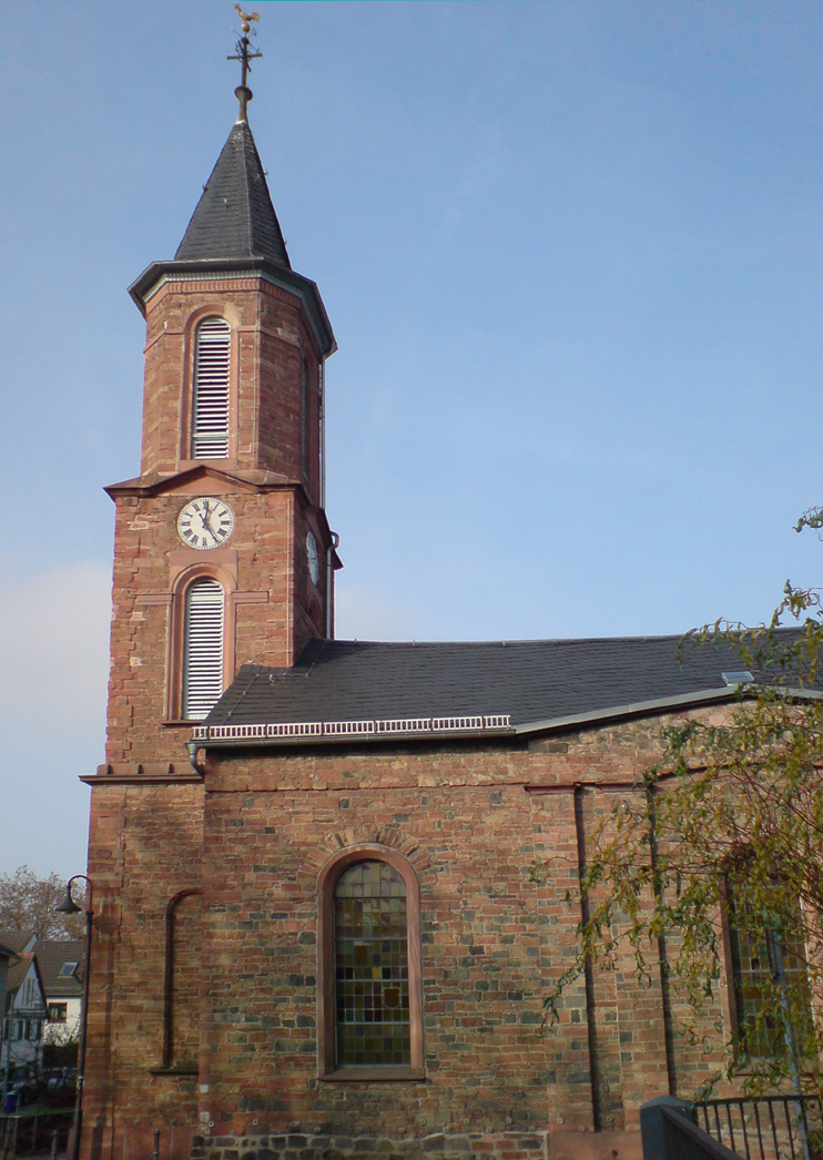 Ev. Kirche Frankfurt am Main - Hausen